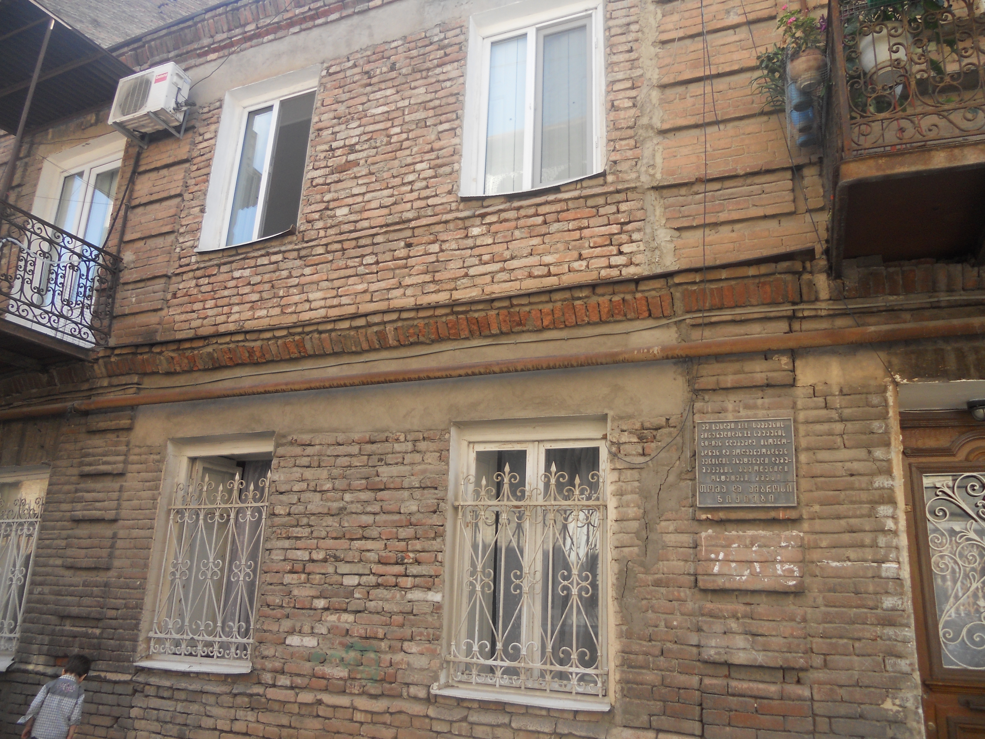 საცხოვრებელი სახლი